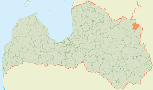 Лиепнская волость на карте ЛатвииLatviešu: Liepnas pagasts